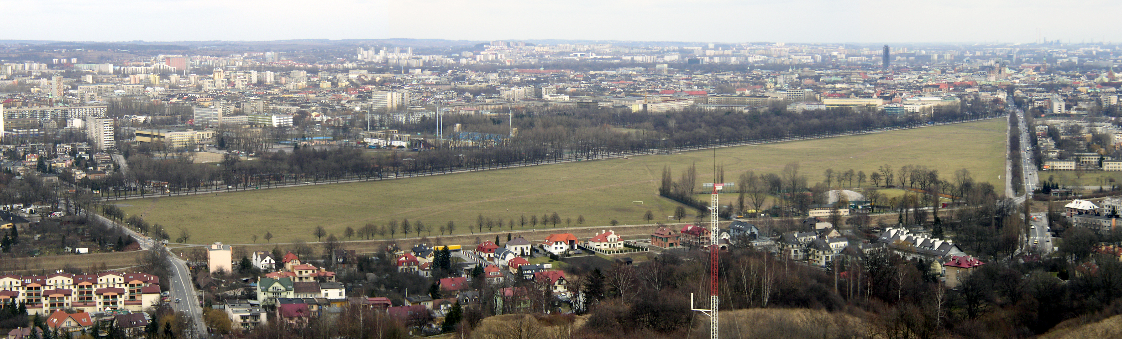 Kraków – Błonia – view from Kopiec Kościuszki